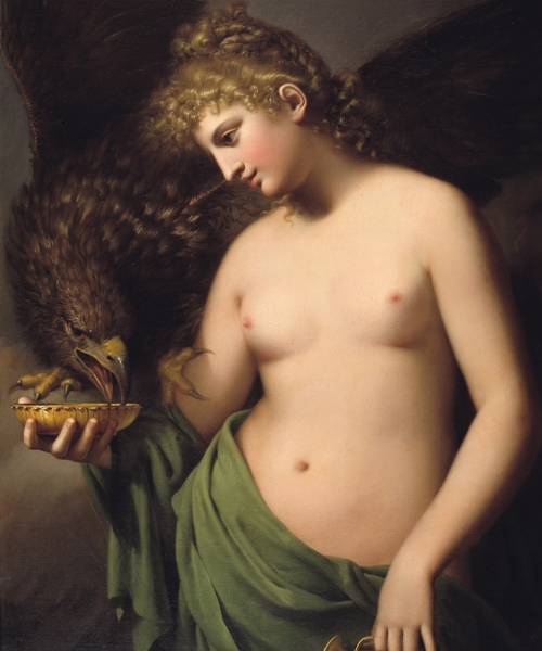 ? × ? cm